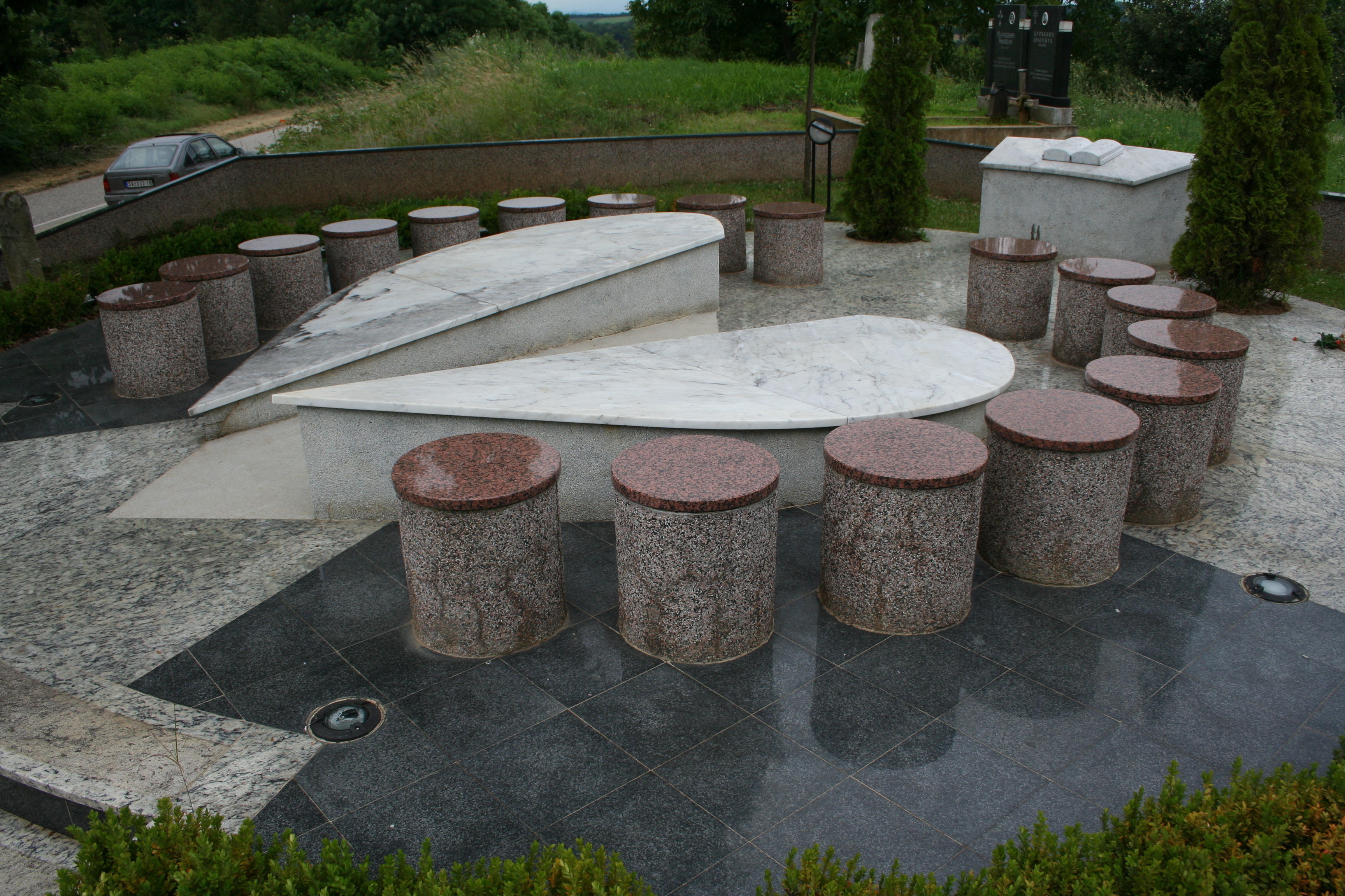 Ašikov grob (Spomenik ljubavi), opština Koceljeva